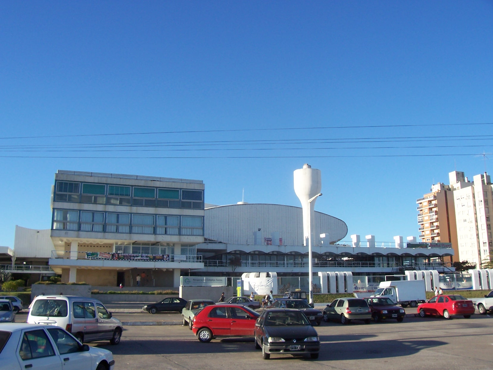 El Complejo Casino de Necochea, en Argentina, antes del incendio en el 2001.